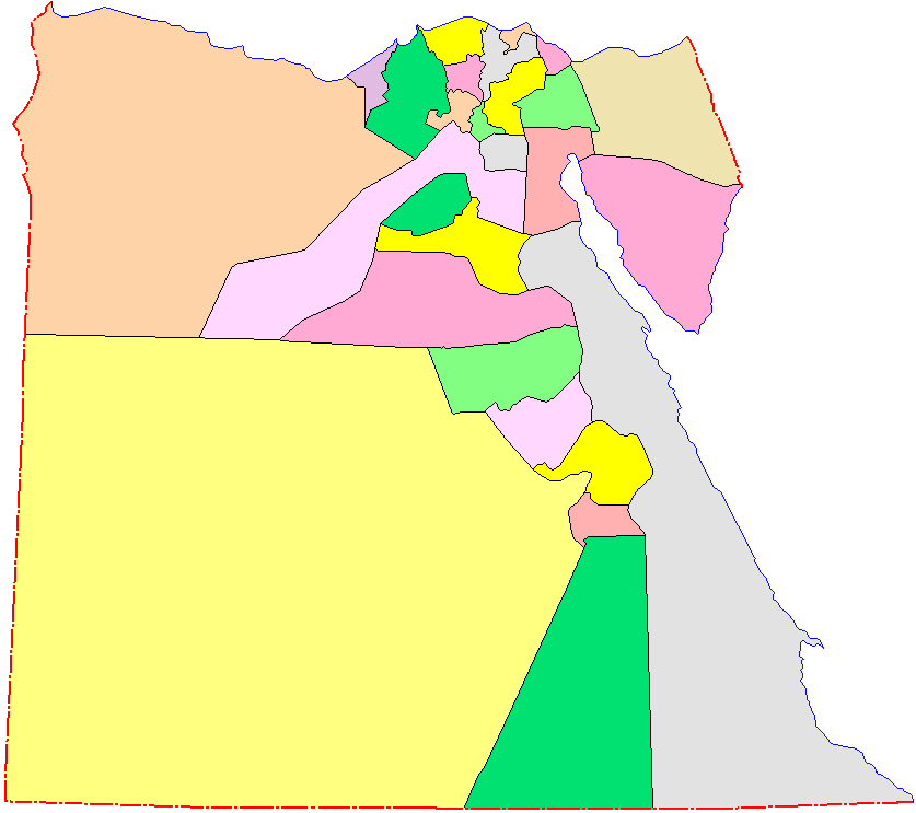 ألوان أخرى فاتحة لمحافظات مصر